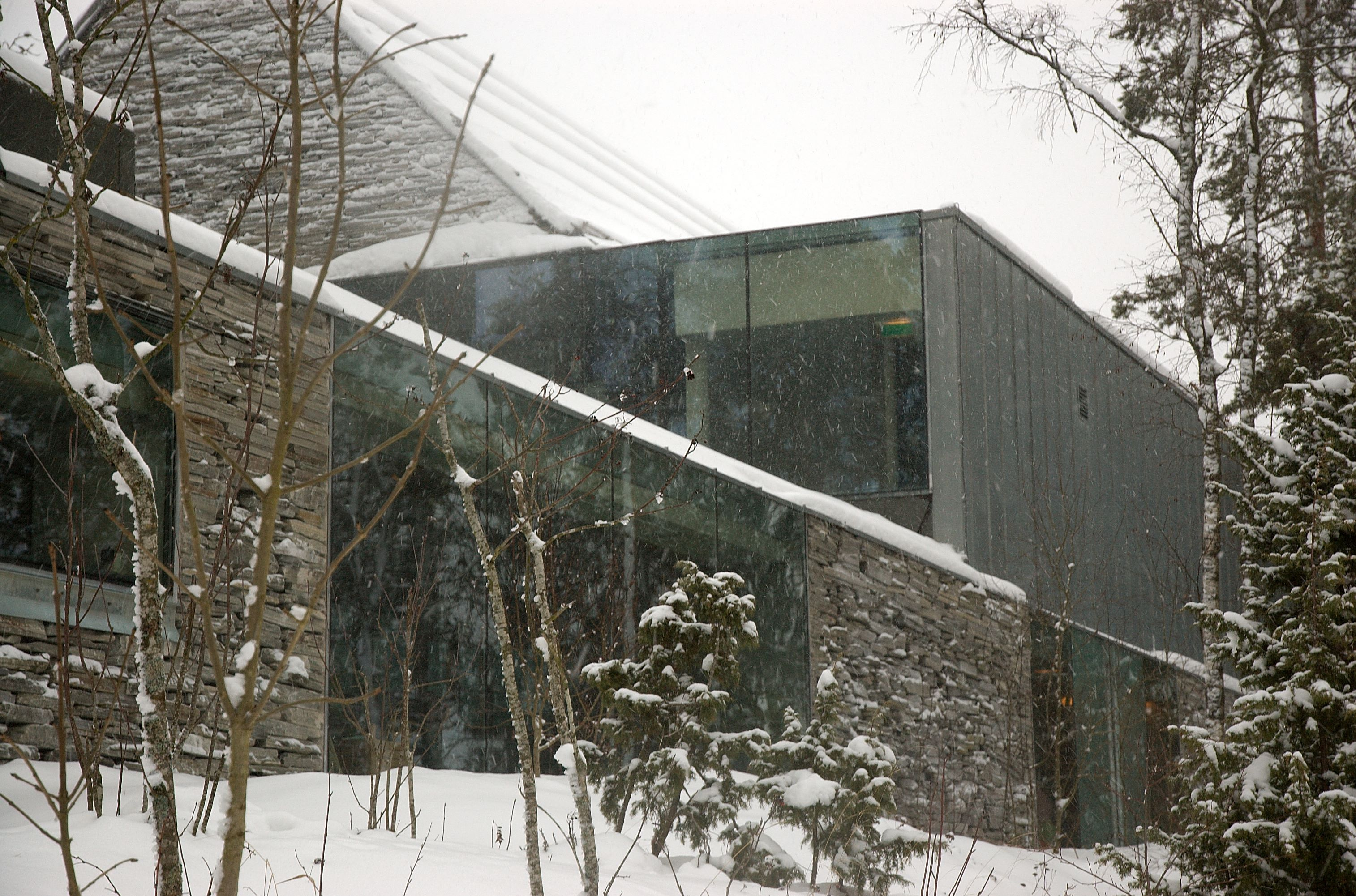 Mortensrud kirke i Oslo